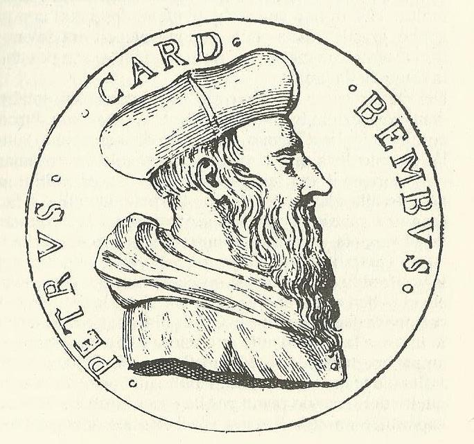 Disegno di medaglia del 1539 raffigurante Pietro Bembo